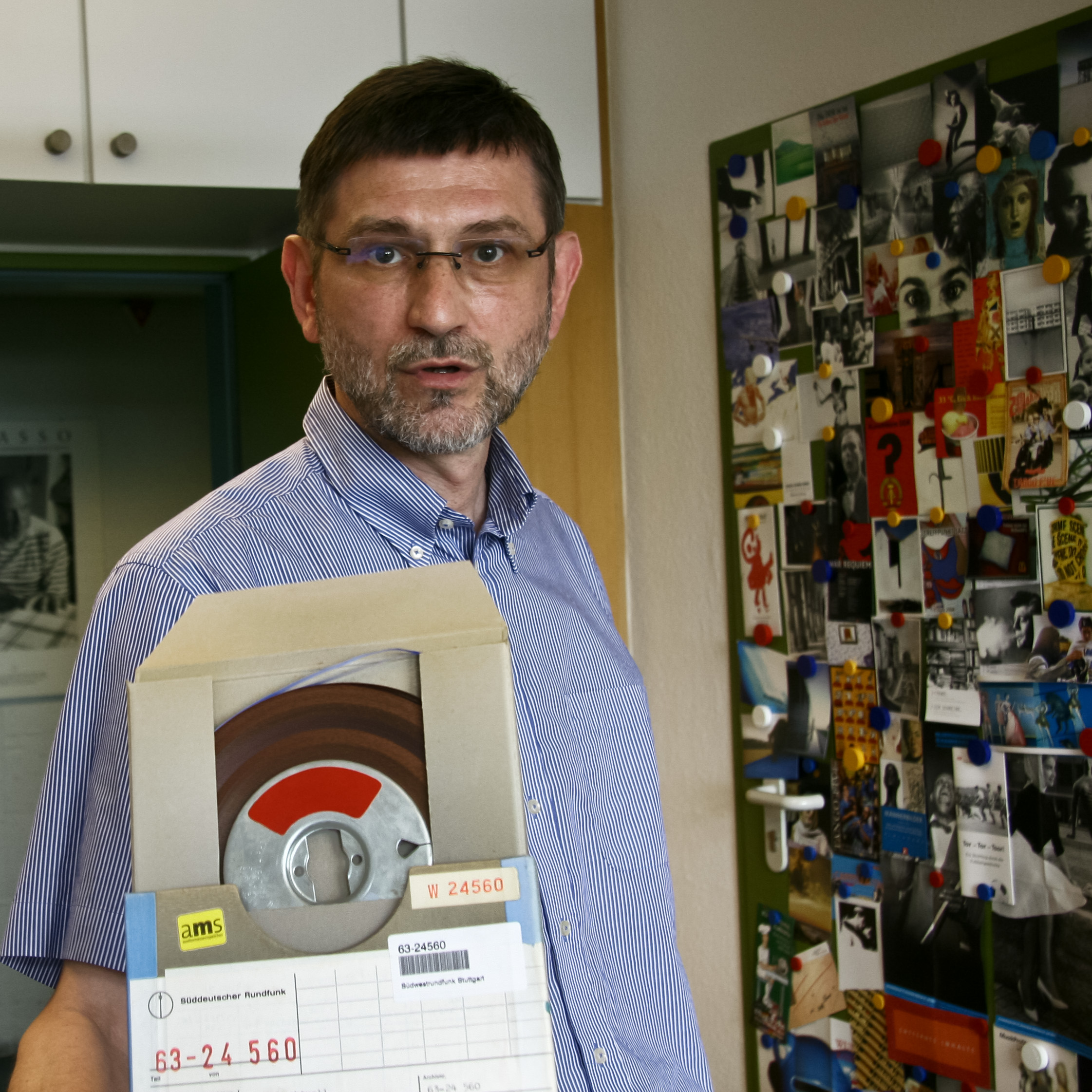 Der Dokumentar und Historiker Dr. Georg Polster vom Südwestrundfunk SWR in Stuttgart hält ein Tonband von 1977 aus seinem riesigen Archiv in der Hand.